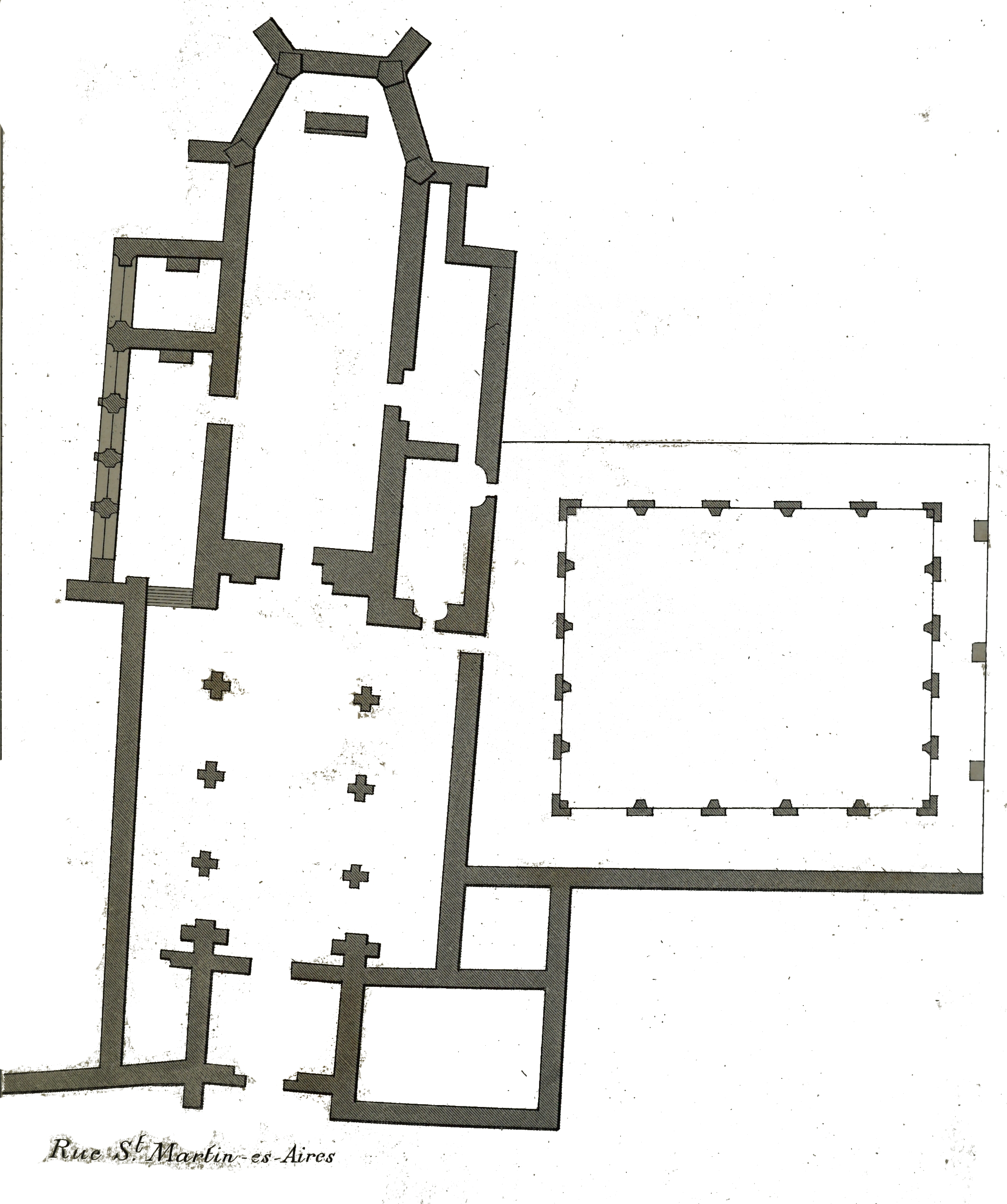 plan de l'église et du cloitre